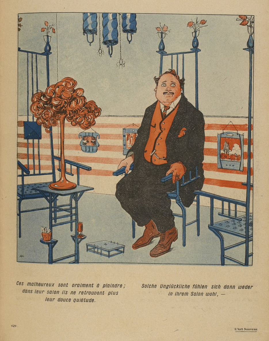 Caricature in l'Assiette au beurre n°339